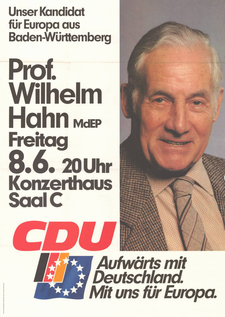 Unser Kandidat für Europa aus Baden-Württemberg Prof. Wilhelm Hahn MdEP ... CDU Aufwärts mit Deutschland. Mit uns für Europa. Abbildung: Porträtfoto Plakatart: Ankündigungsplakat Auftraggeber: CDU-Bundesgeschäftsstelle, Abt. Öffentlichkeitsarbeit, Bonn Drucker_Druckart_Druckort: Willy F.P. Fehling GmbH, Hannover Objekt-Signatur: 10-030 : 156 Bestand: Europawahlplakate (10-030) GliederungBestand10-18: Europawahlplakate (10-030) » Europawahl am 17.6.1984 » CDU Lizenz: KAS/ACDP 10-030 : 156 CC-BY-SA 3.0 DE